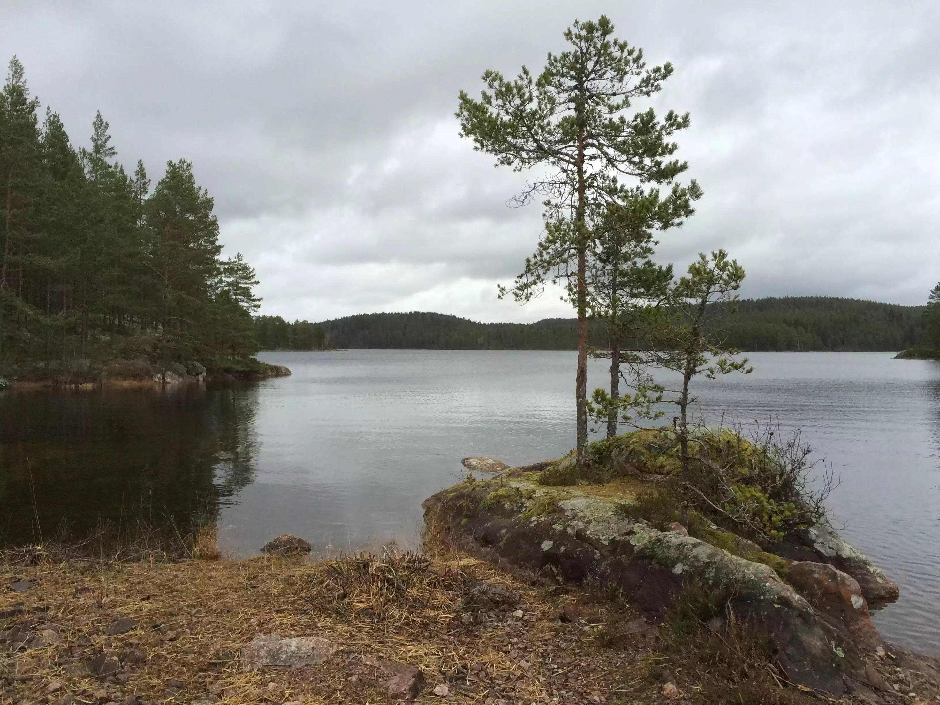 Store Langsjøen i Aurskog-Høland kommune, sett fra sørenden.